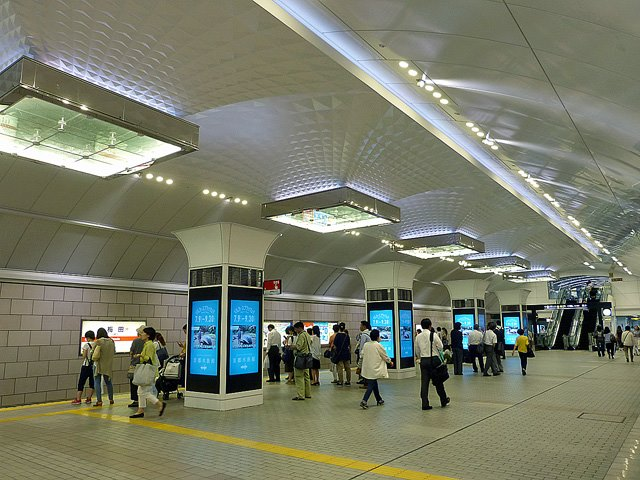 大阪市交通局御堂筋線梅田駅、千里中央方面行きホーム（改装後）